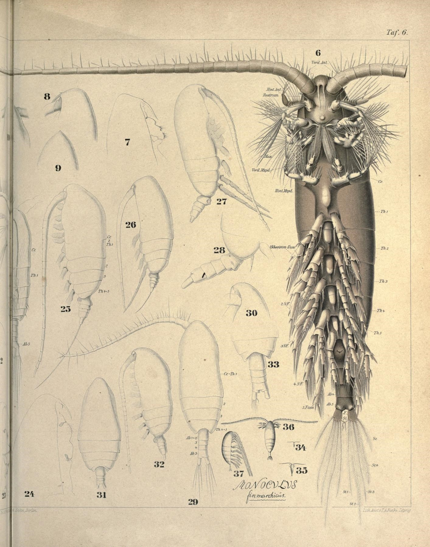 Ta/'. .).